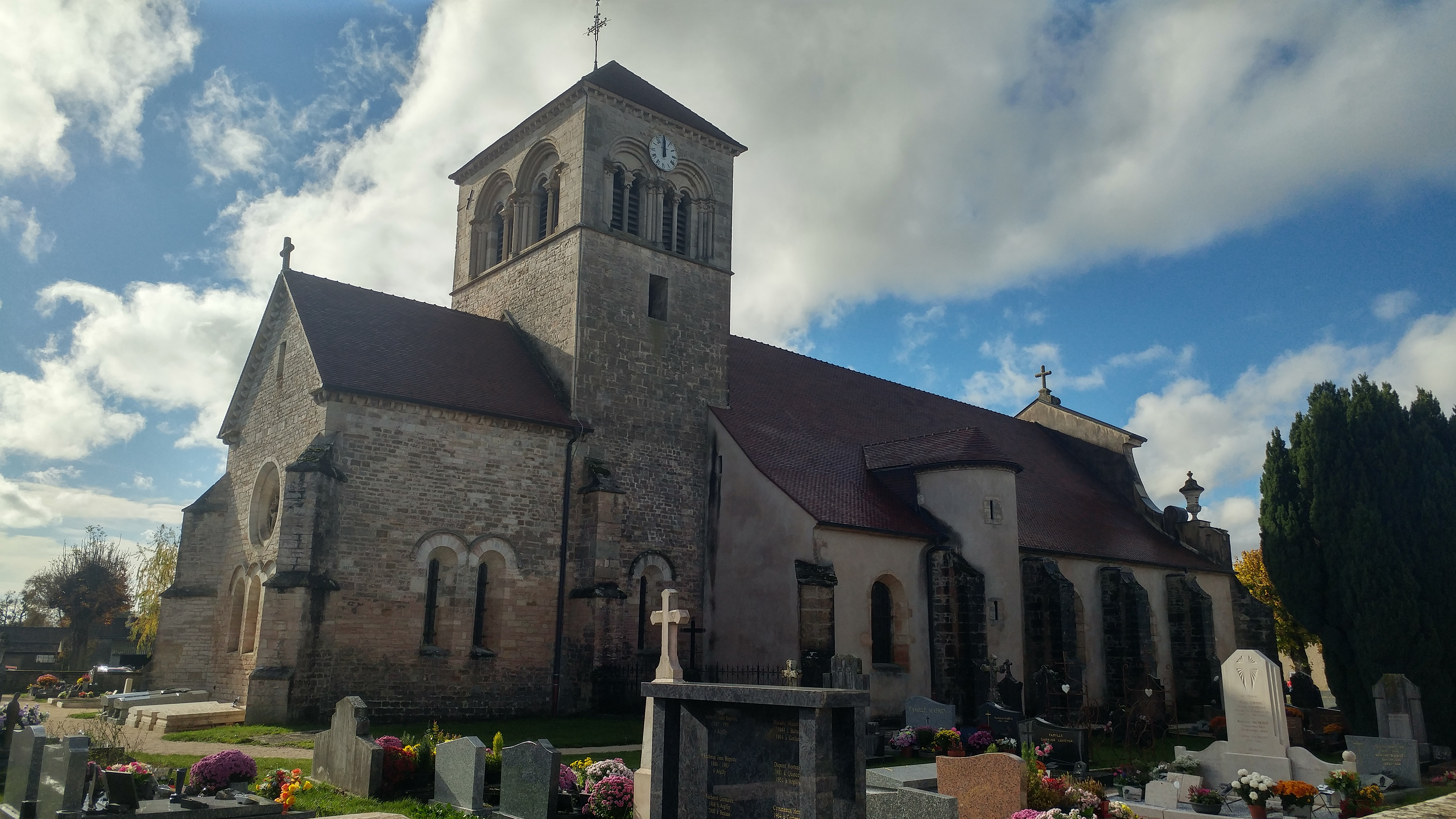 Face Nord-Ouest de l'église